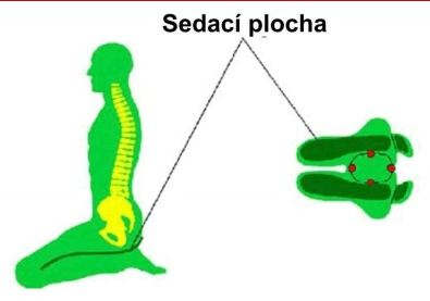 Osoba sedící v poloze virásana v souvislostí s židlí Ásana.